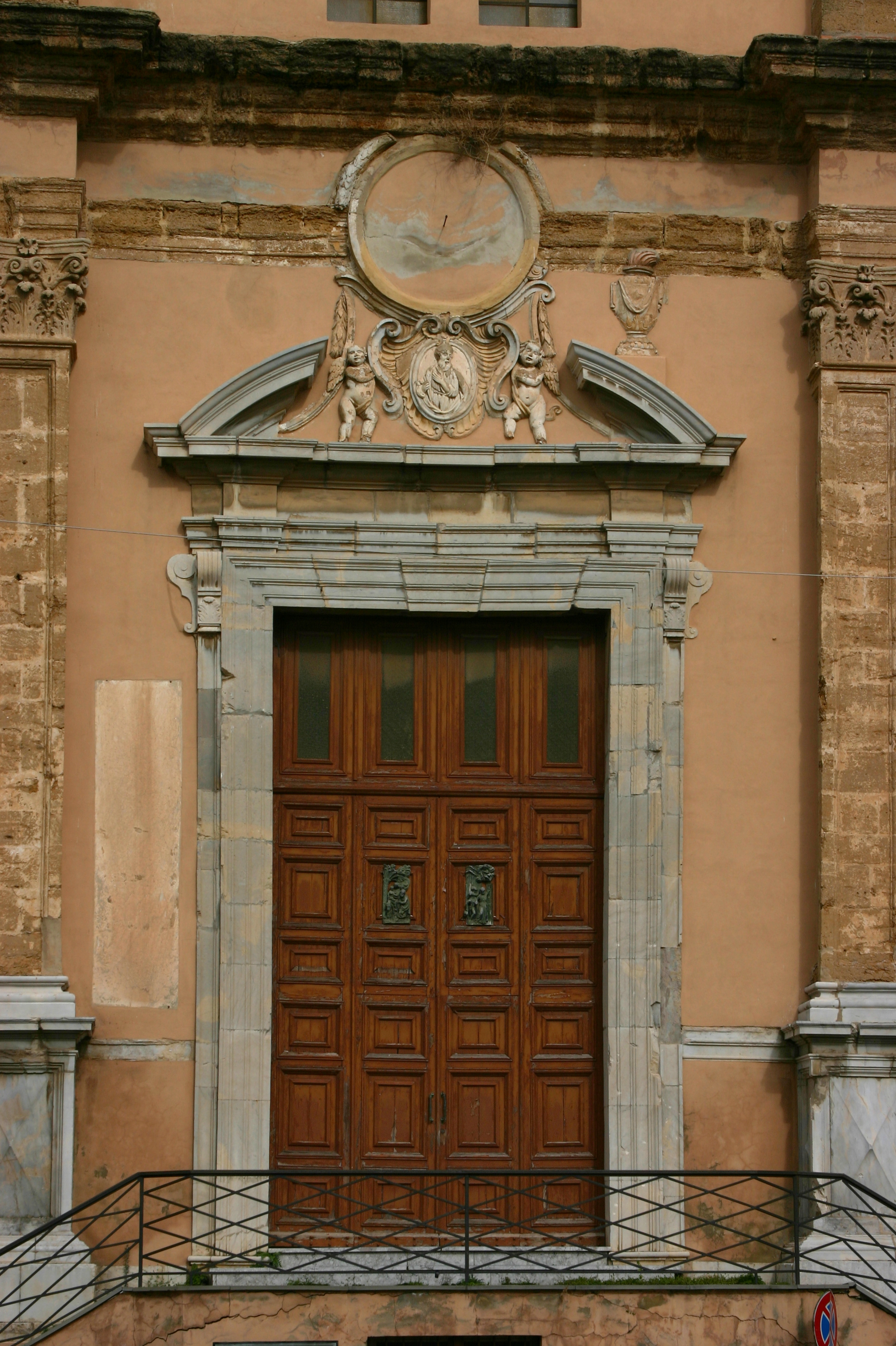 San Giuseppe